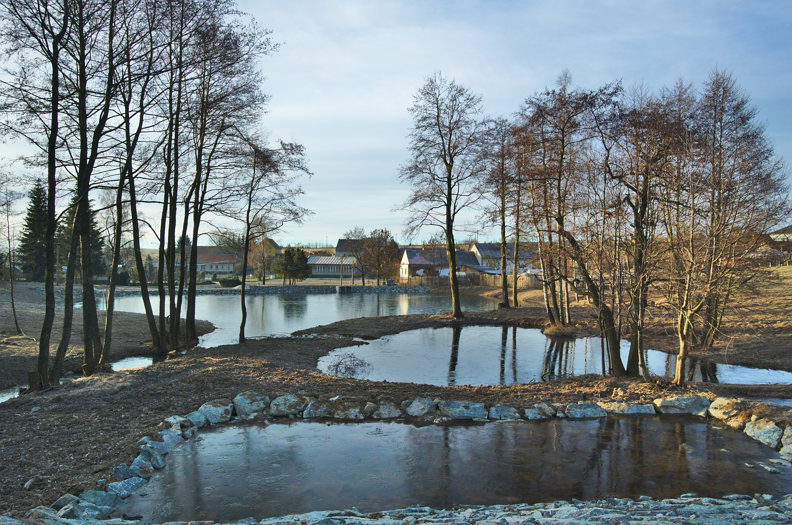 Požární nádrž, Buková, okres Prostějov